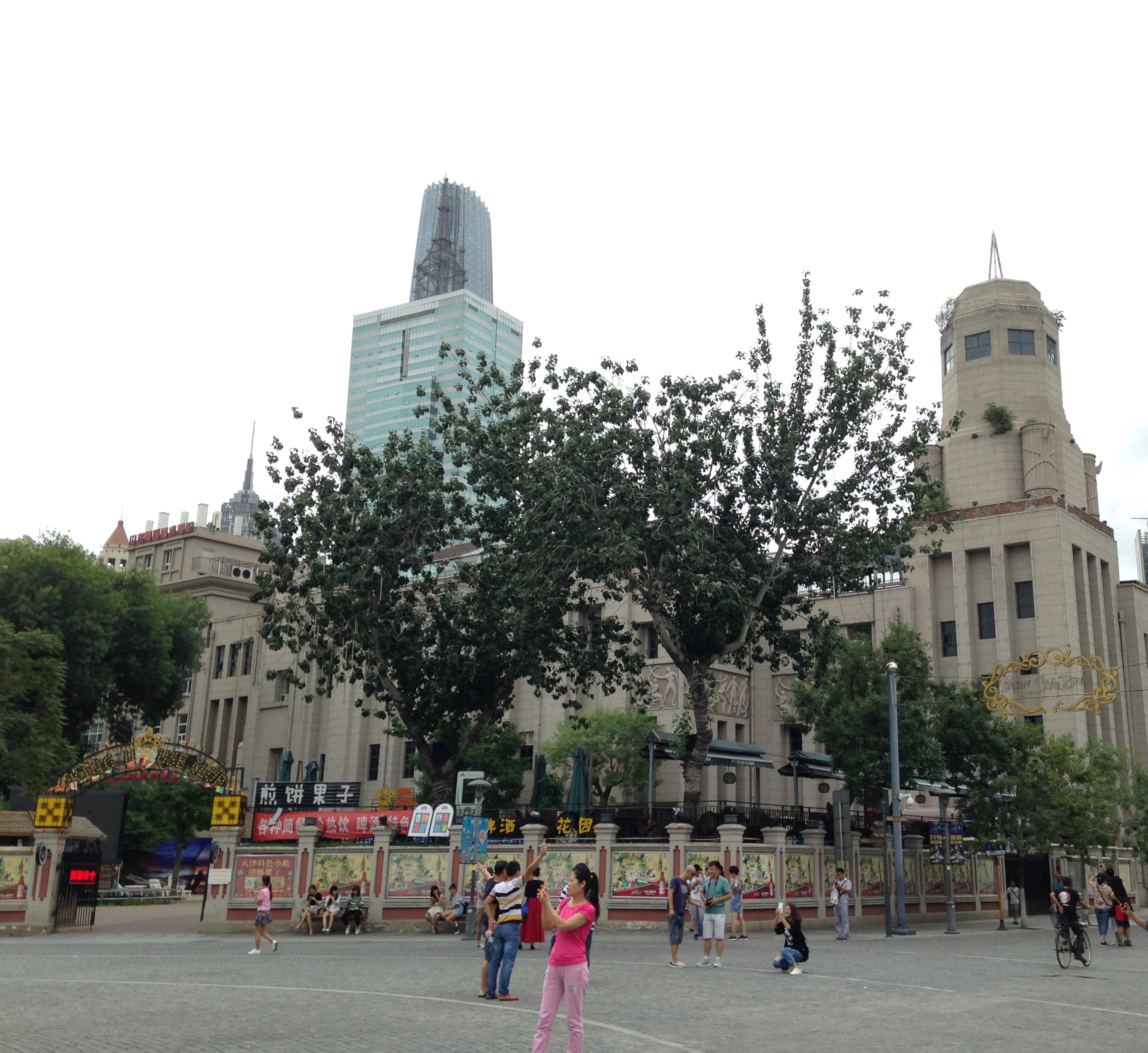 マルコ・ポーロ広場